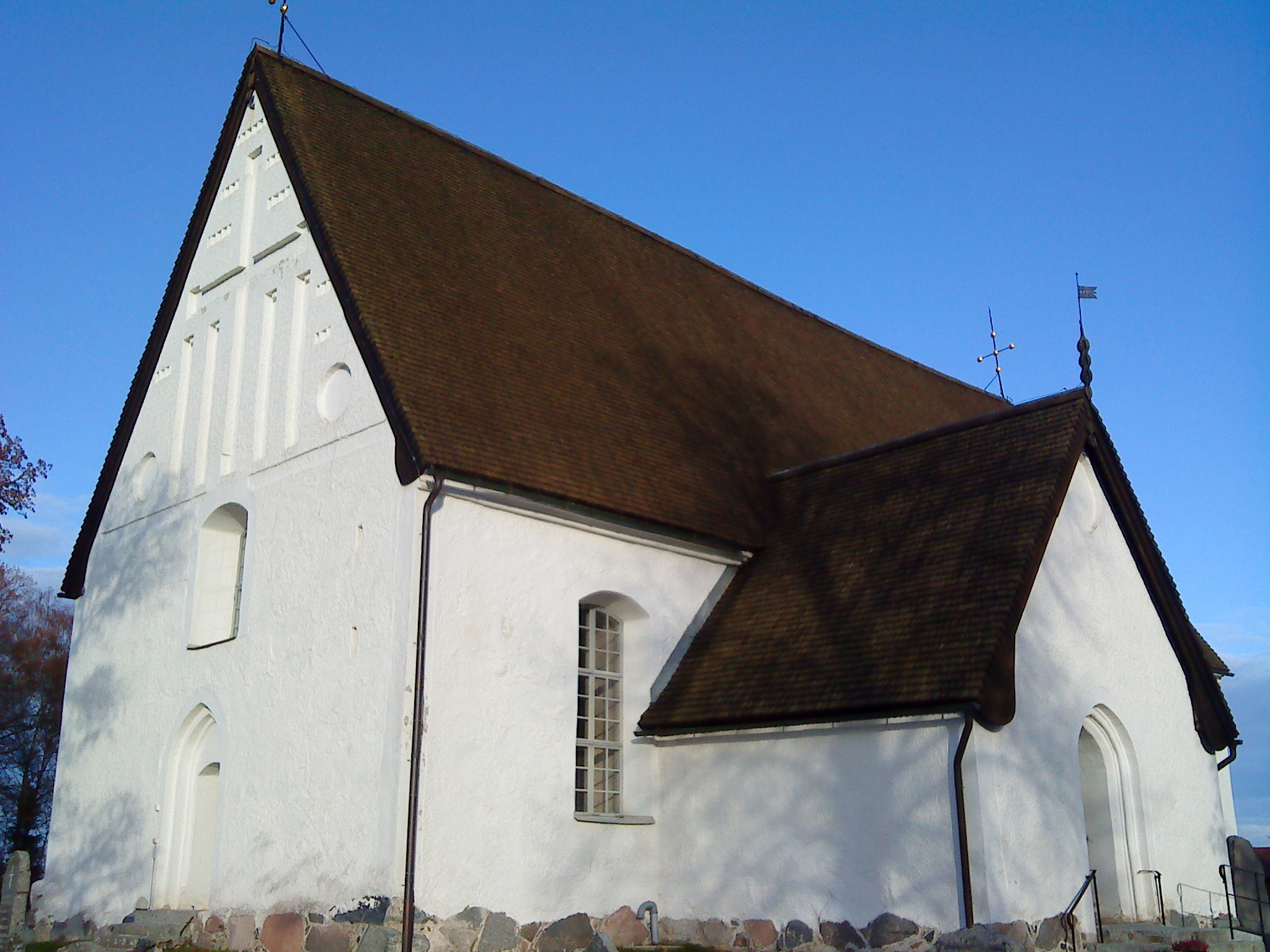 Viksta kyrka från sydväst